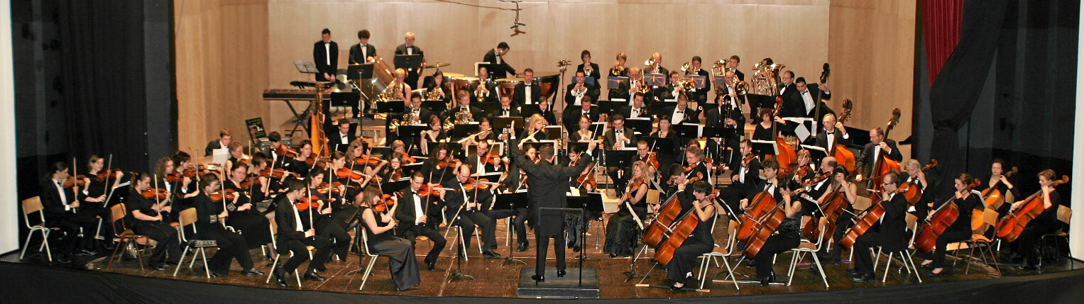 In het Sint-Michielstheater – « Bel Canto » 2007